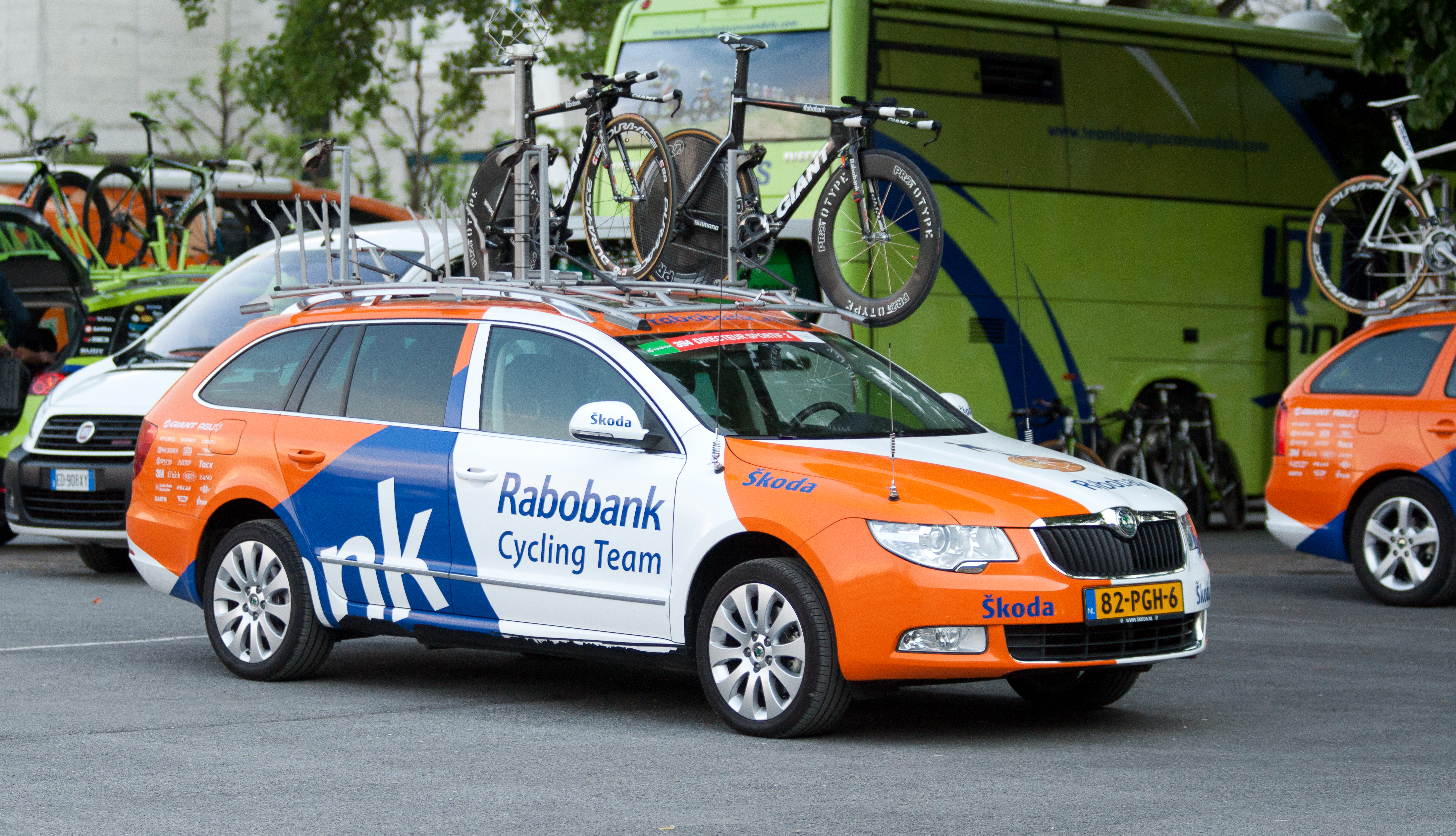 Contre la montre - Romandie 2010